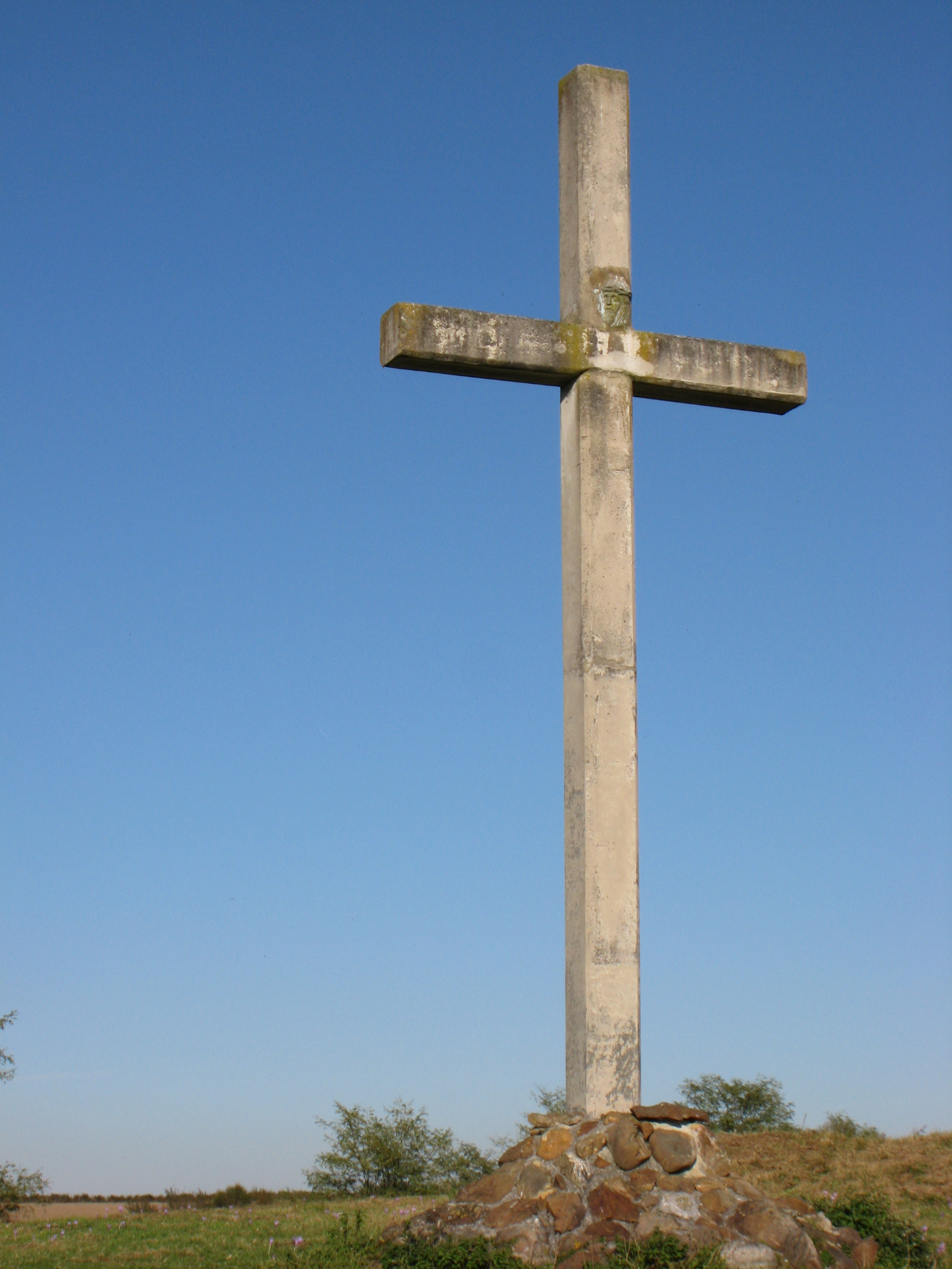 Croix d'Escout (précédemment posée sur le dolmen proche (Pyrénées Atlantiques) Pyrénées).